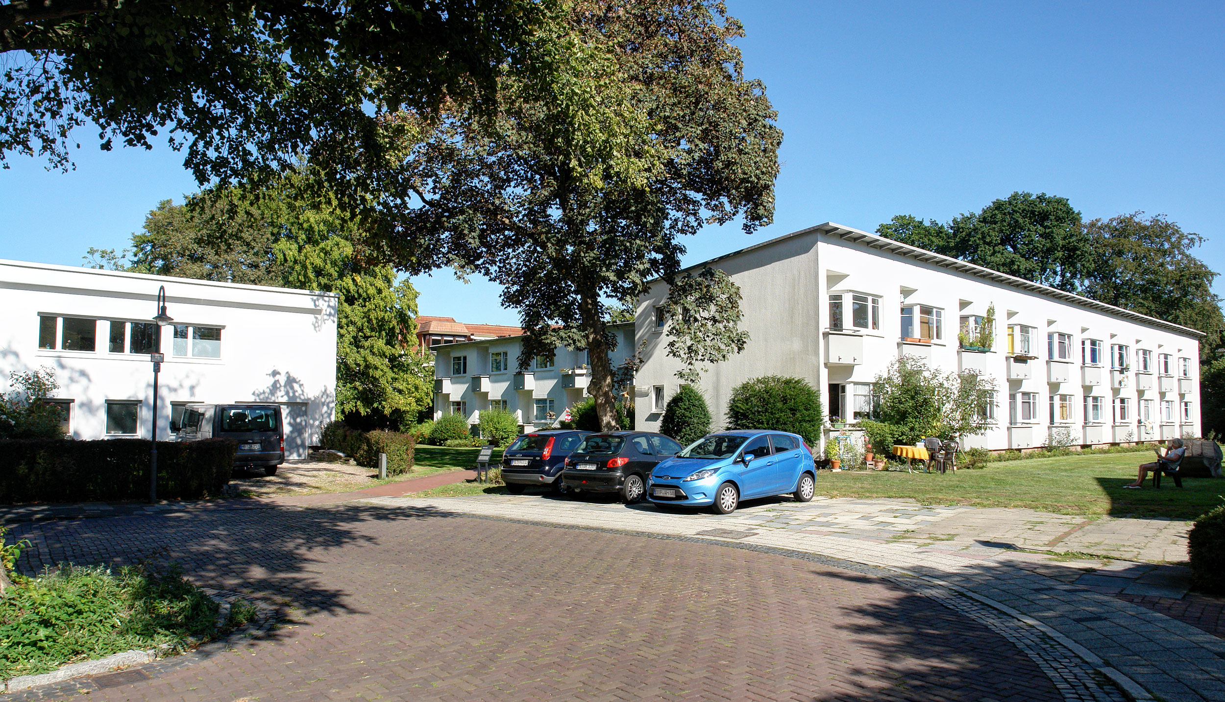 Wohnanlage Kohlmannstraße in Bremen, Kohlmannstraße 1Die Gesamtanlage ist ein geschütztes Kulturdenkmal in der Freien Hansestadt Bremen, mit der Nr. 0718 beim Landesamt für Denkmalpflege registriert.